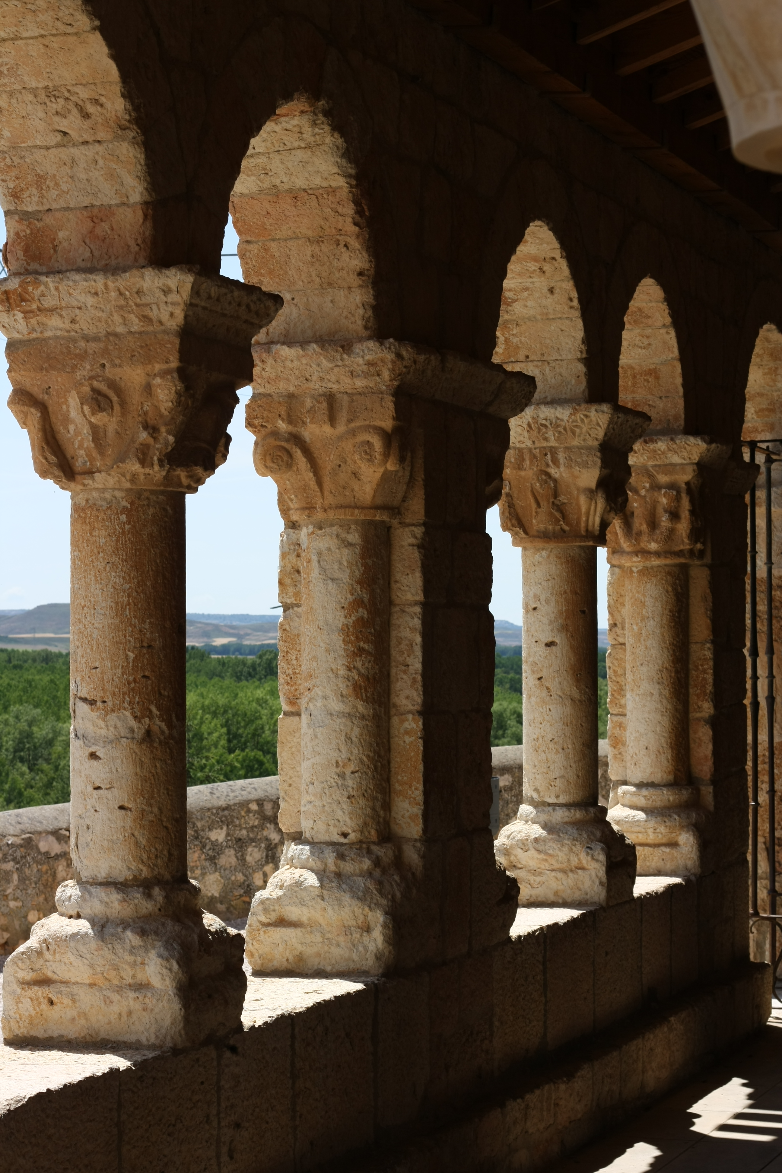 Romanische Kirche Santa María oder Nuestra Señora del Rivero in San Esteban de Gormaz, Vorhalle